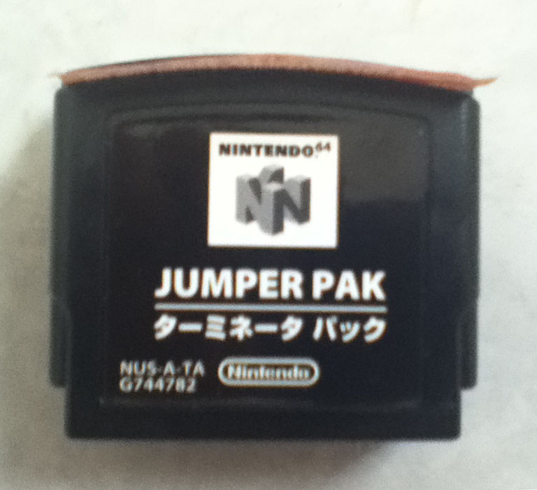 Vista Frontal del Accesorio Jumper Pack de Nintendo 64